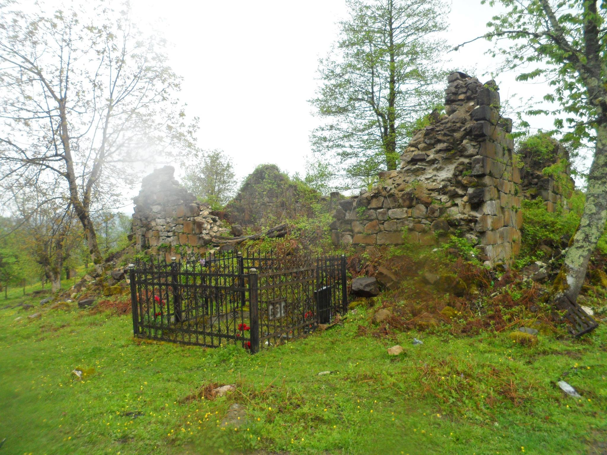 კოპალიანების საგვარეულო ეკლესიის ნანგრევები. ლეჩხუმი. ხოფელი ლუხვანო.